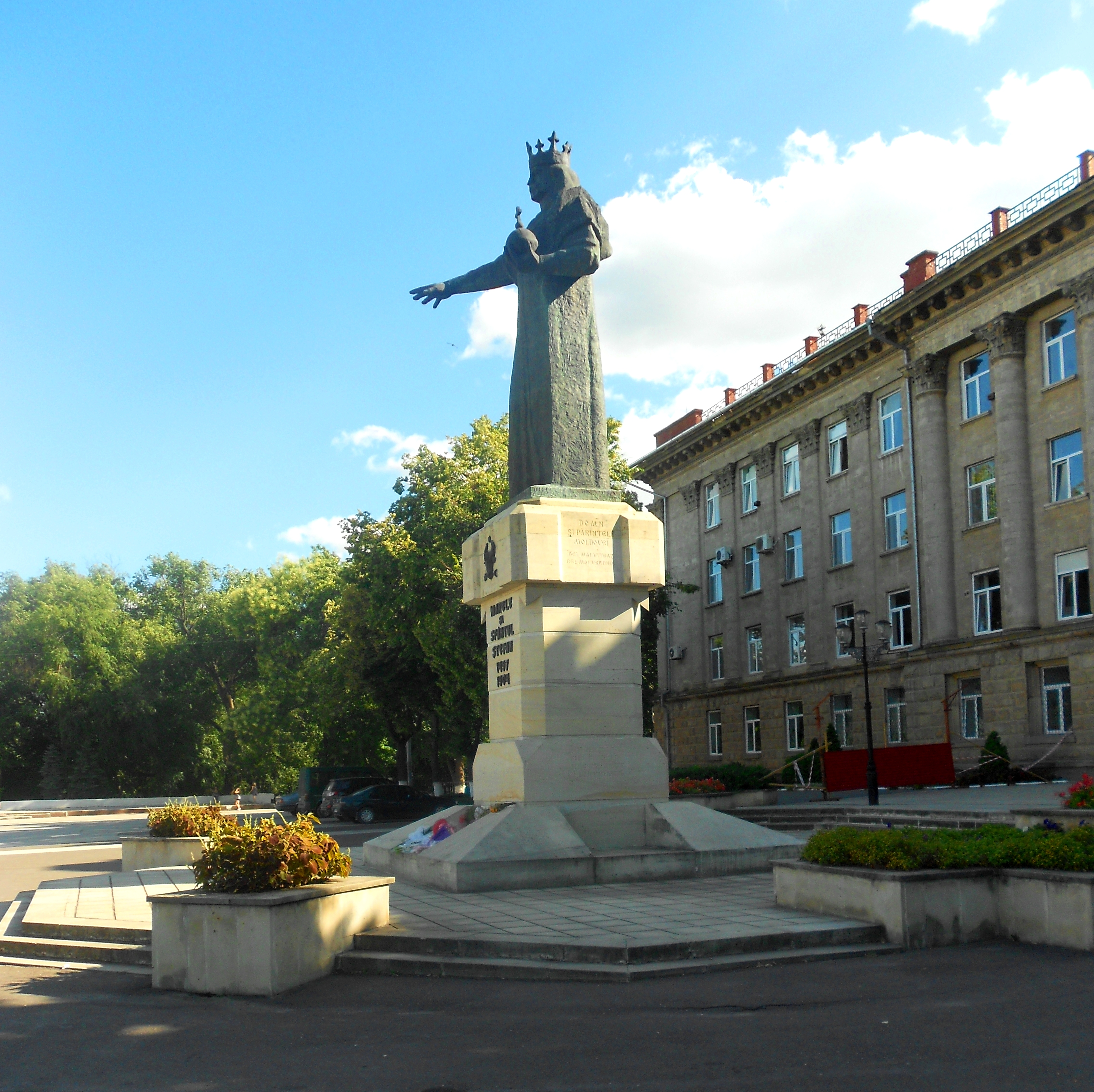 Monumentul lui Ștefan cel Mare, Bălți